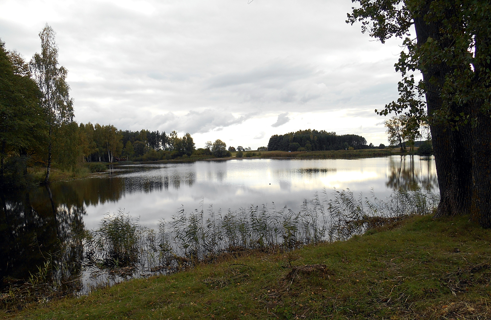 Gudelių kaimo tvenkinio nuotrauka.